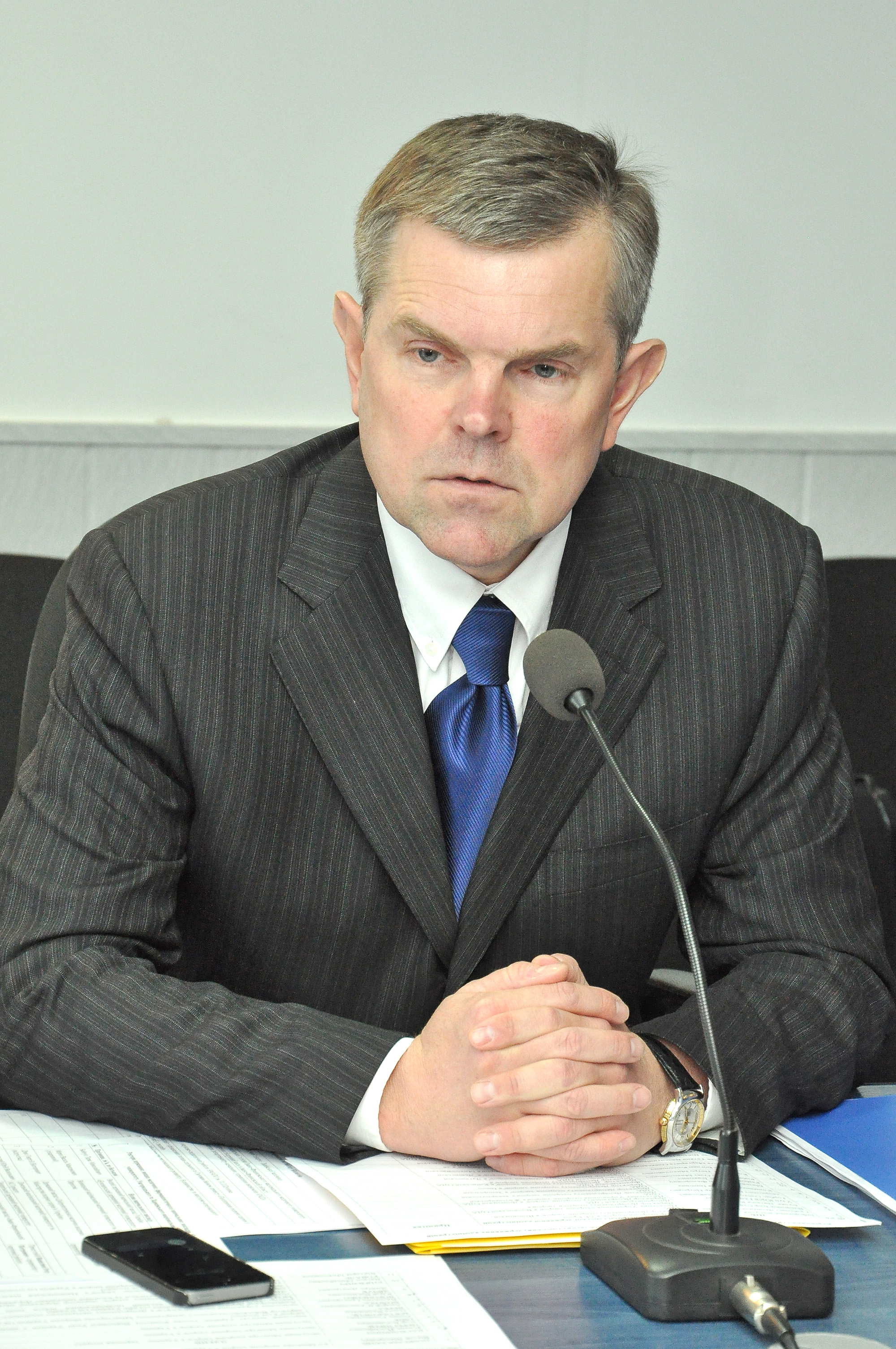 В. о. Міністра охорони здоров'я України Віктор Шафранський на виїзній колегії МОЗ України в конгрес-центрі НОК «Червона калина» ТДМУ в Теребовлянському районі Тернопільської області 20 травня 2016 року.